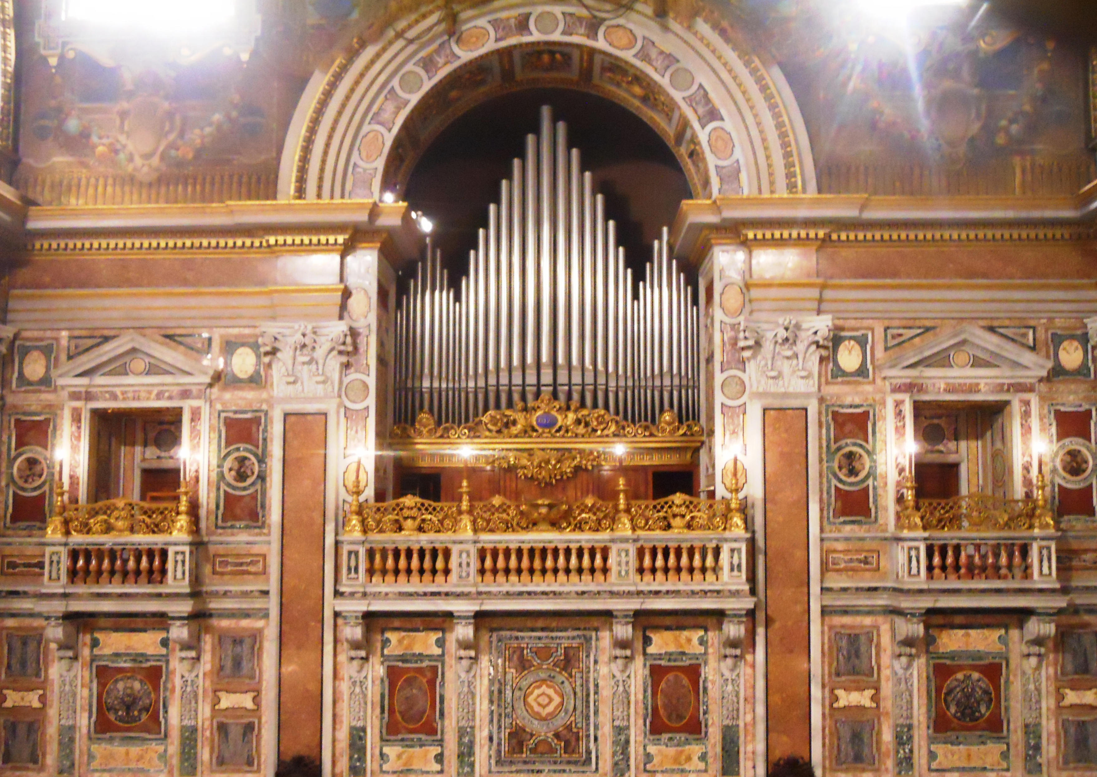 Veduta della parete sinistra del coro della basilica di San Giovanni in Laterano a Roma con l'organo Morettini (II+P/24)